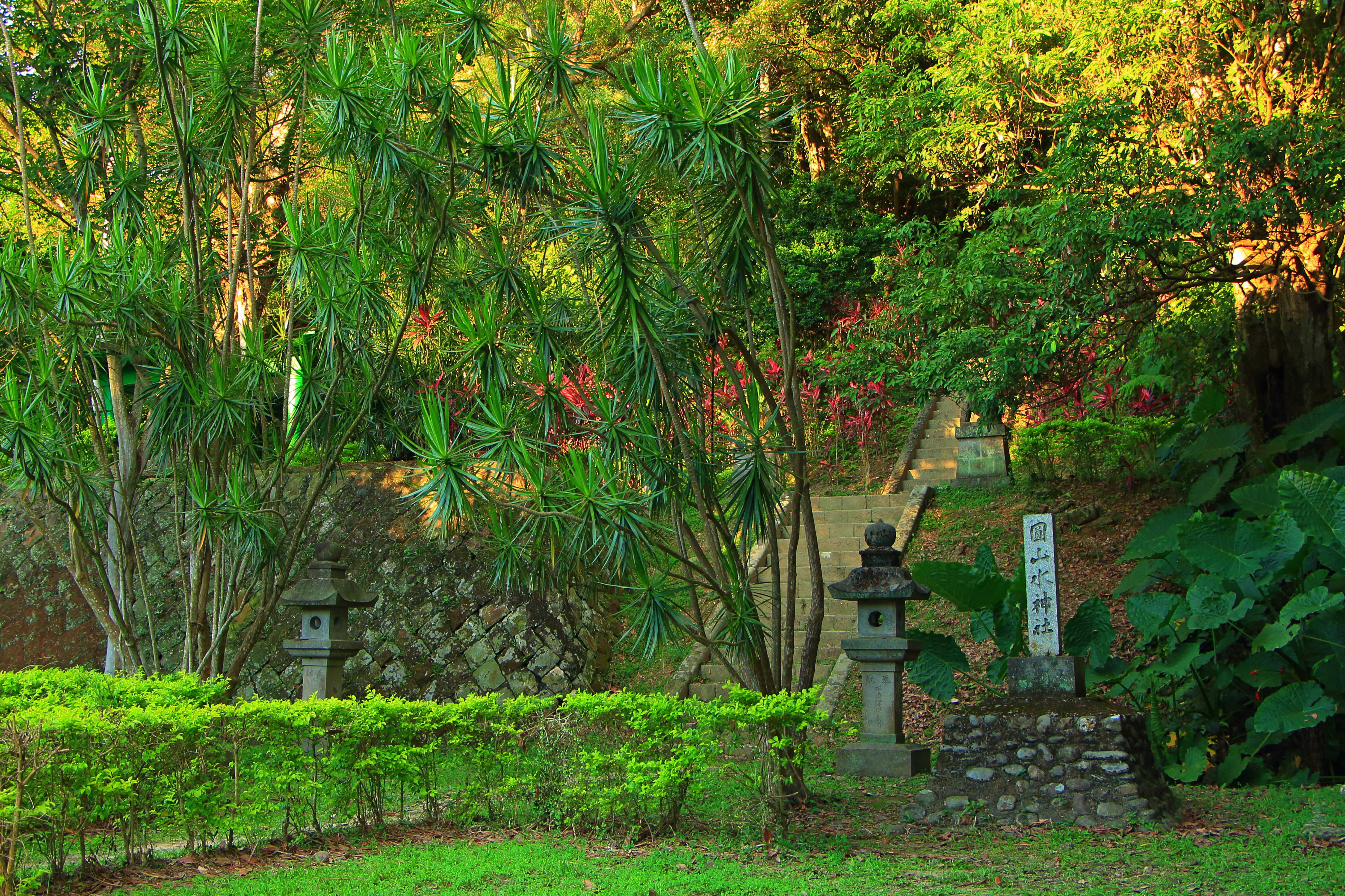 草山水道系統圓山水神社。